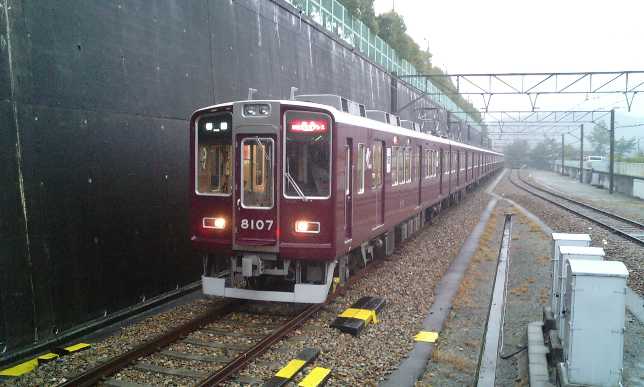 阪急電鉄8000系車両 日生中央駅 留置線